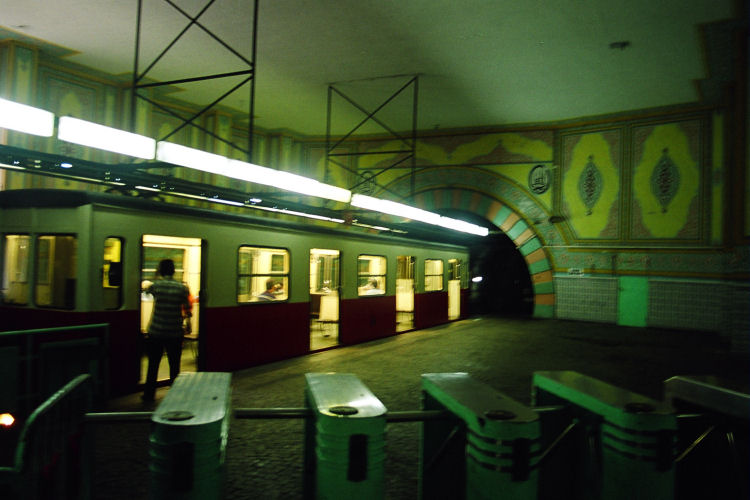 Tünnel